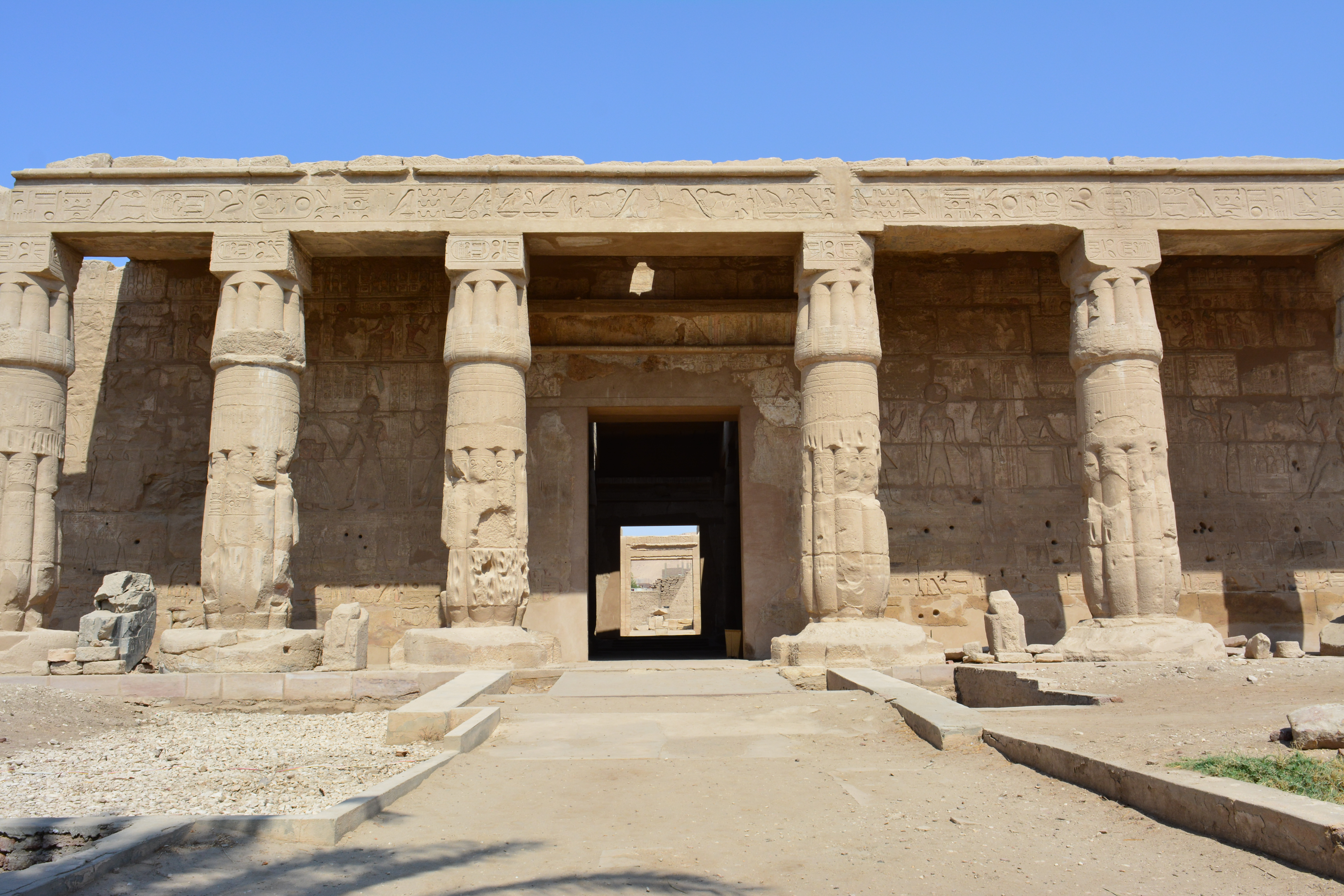 Luxor Nyugati part, az ókori thébai nekropolisz területén.